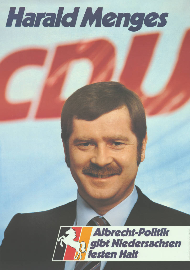 Harald Menges CDU Albrecht-Politik gibt Niedersachsen festen Halt Abbildung: Porträtfoto - Nationalfarben mit Niedersachsenross Plakatart: Kandidaten-/Personenplakat mit Porträt Auftraggeber: Verantw.: Niedersachsen-CDU, Hannover Drucker_Druckart_Druckort: Willy F.P. Fehling GmbH, Hannover Objekt-Signatur: 10-008 : 492 Bestand: Landtagswahlplakate Niedersachsen (10-008) GliederungBestand10-18: Landtagswahlplakate Niedersachsen (10-008) » CDU Lizenz: KAS/ACDP 10-008 : 492 CC-BY-SA 3.0 DE